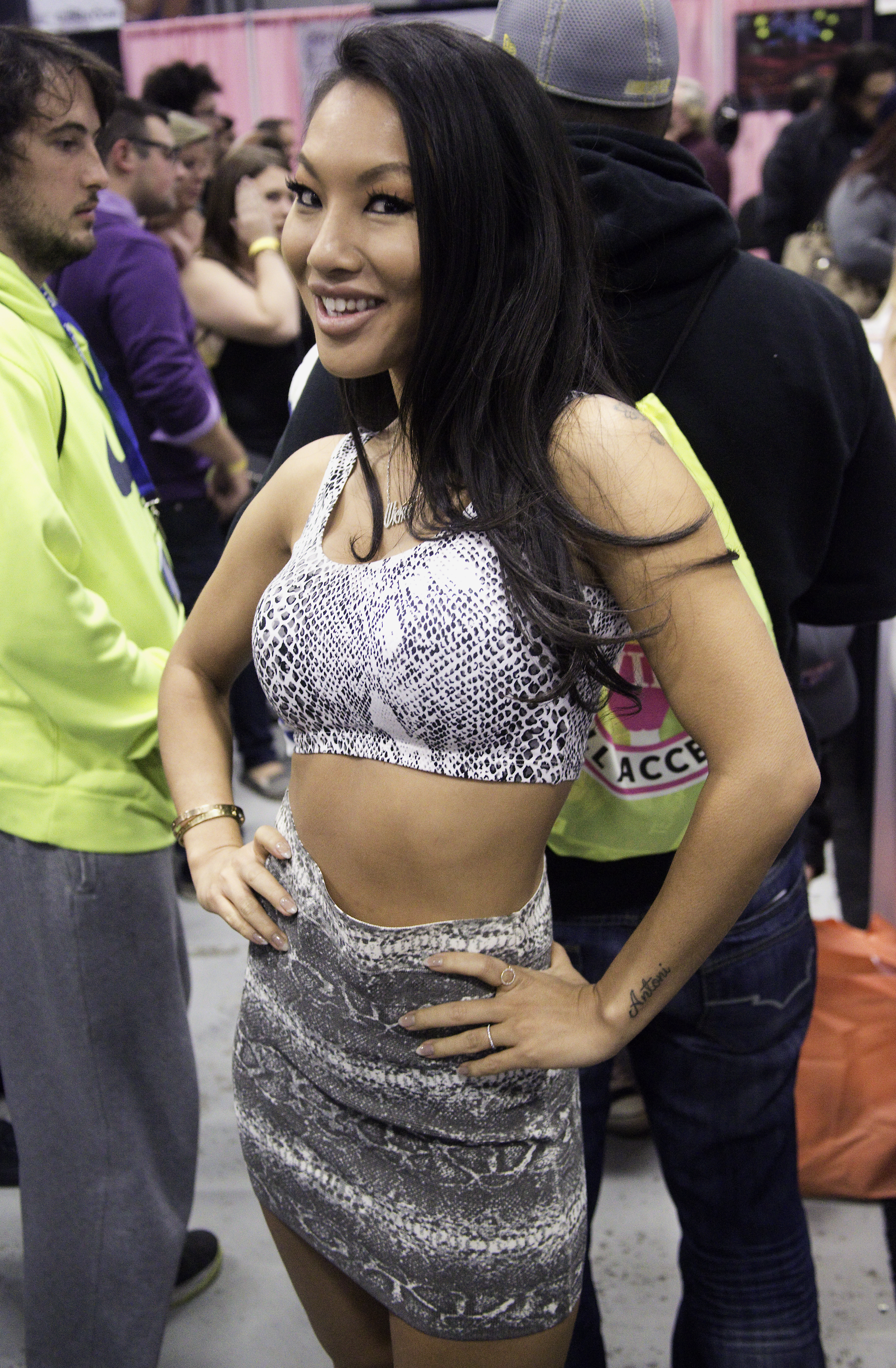 EX15_0018bas